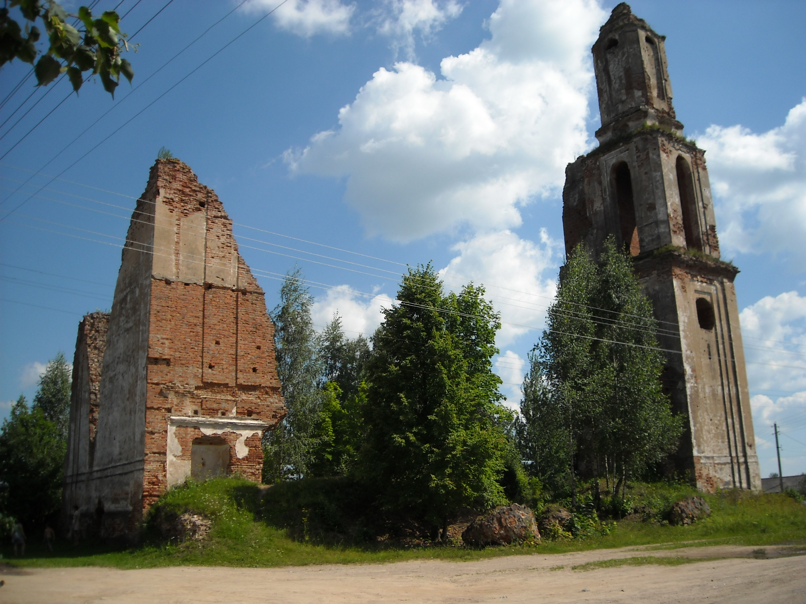 Беларуская (тарашкевіца): Рэшткі касьцёла. в. Губіна This is a photo of Belarusian heritage monument. Reference number: 213Г000501 ( WLM)